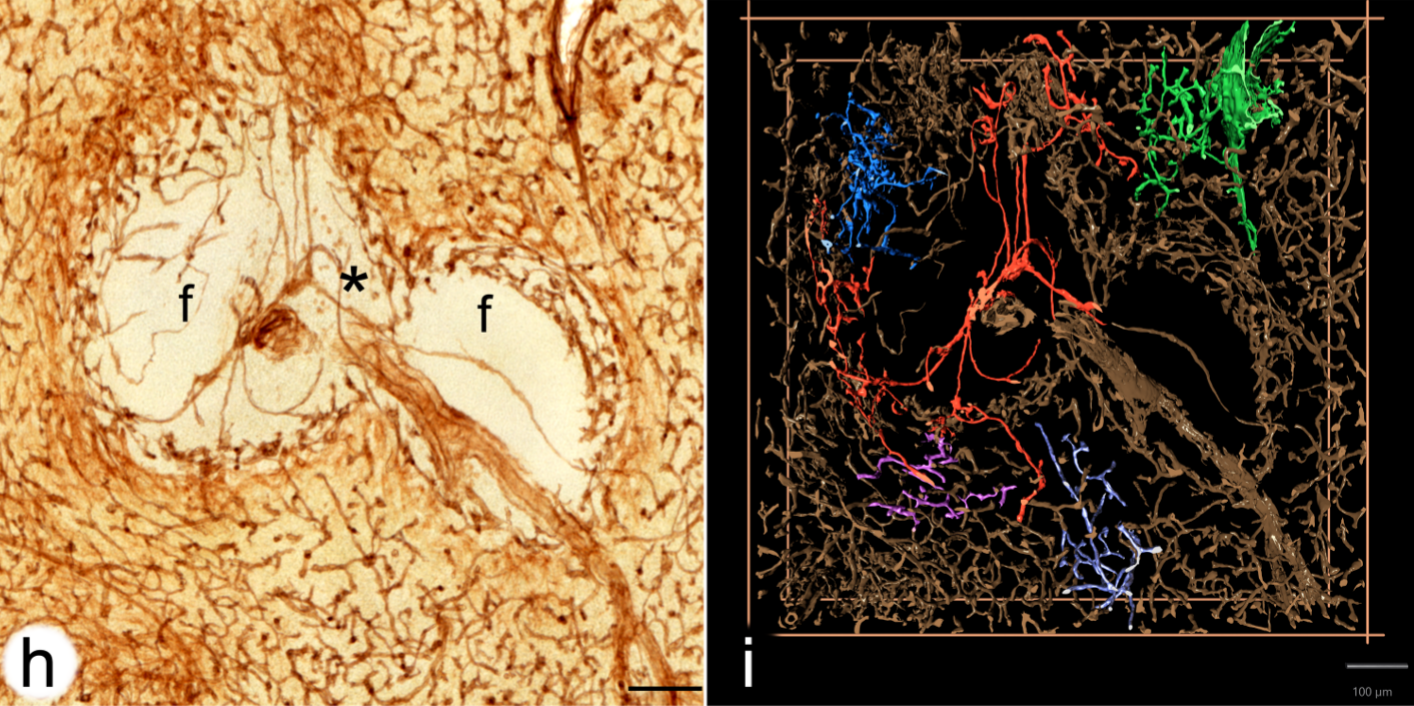 Fig. 1. Visualización de vainas linfáticas periarteriales (PALS), capilares perifoliculares, pulpa roja y pulpa blanca centrados en un folículo. En (h) superposición de las 24 secciones registradas, En (i) primer fotograma de video que muestra un modelo 3D con cinco conexiones entre capilares perifoliculares y pulpa roja resaltados en diferentes colores. Se muestran una parte de una vaina linfática periarterial (PALS asterisco) en el medio. Los capilares internos surgen de una arteria central en los PALS. La tinción CD34 está presente en los endotelios capilares, fibroblastos adventicios de las arterias, endotelios del seno perifolicular (débil) y en fibroblastos en las trabéculas. Barras de escala = 100 μm.